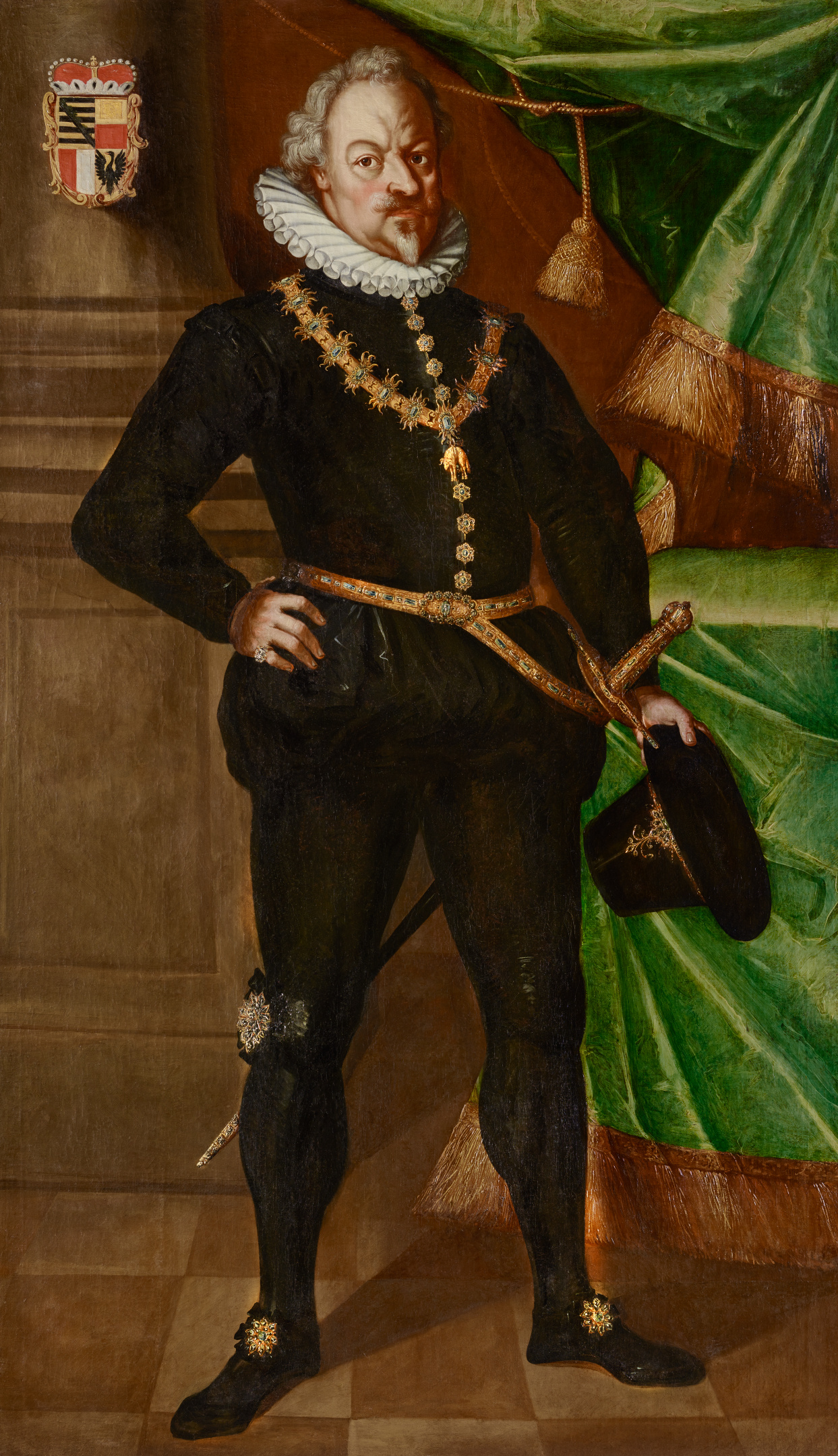 Prince Karl I of_Liechtenstein